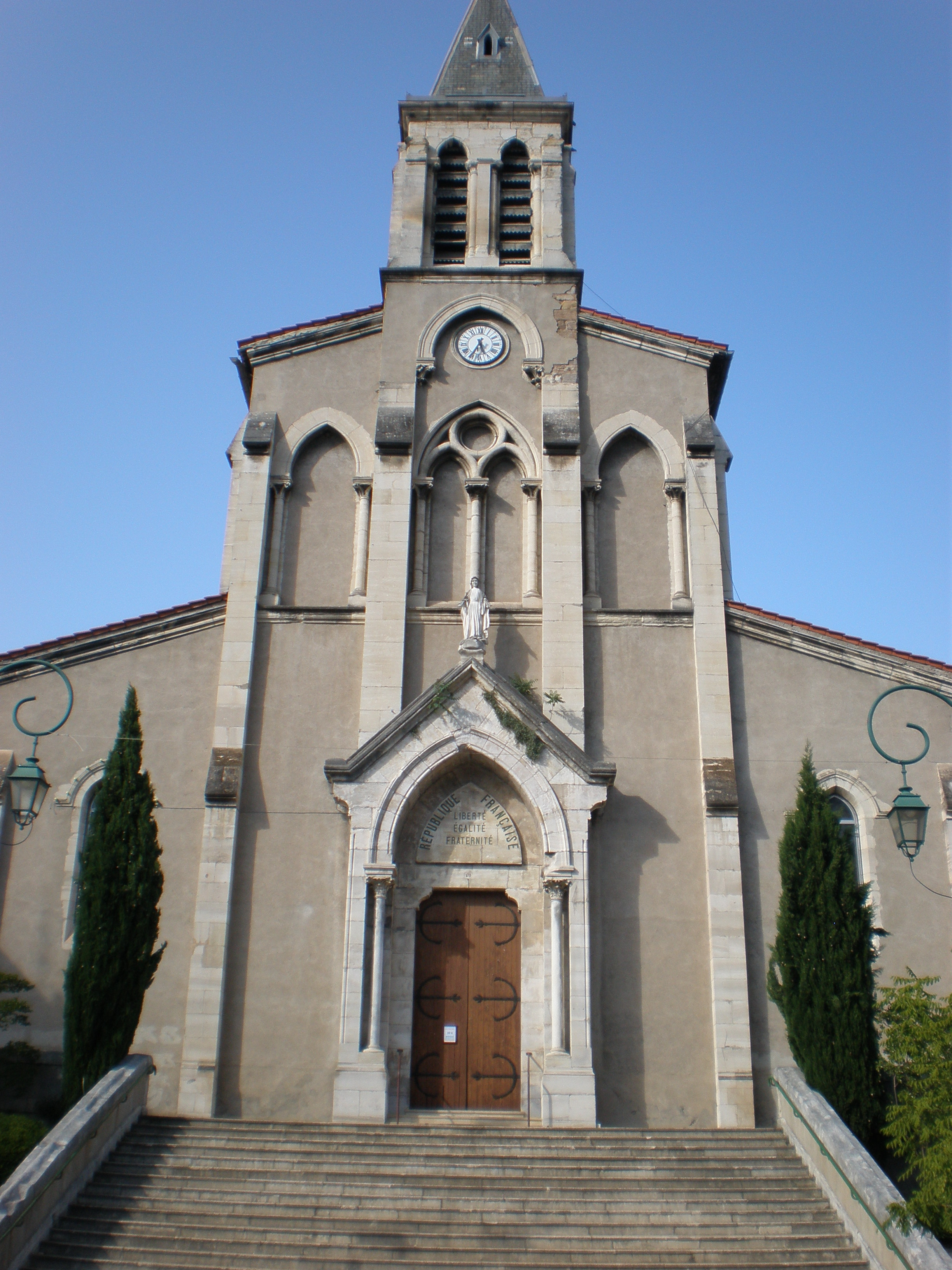 Eglise de l'Immaculée-Conception de Bessèges (gard)